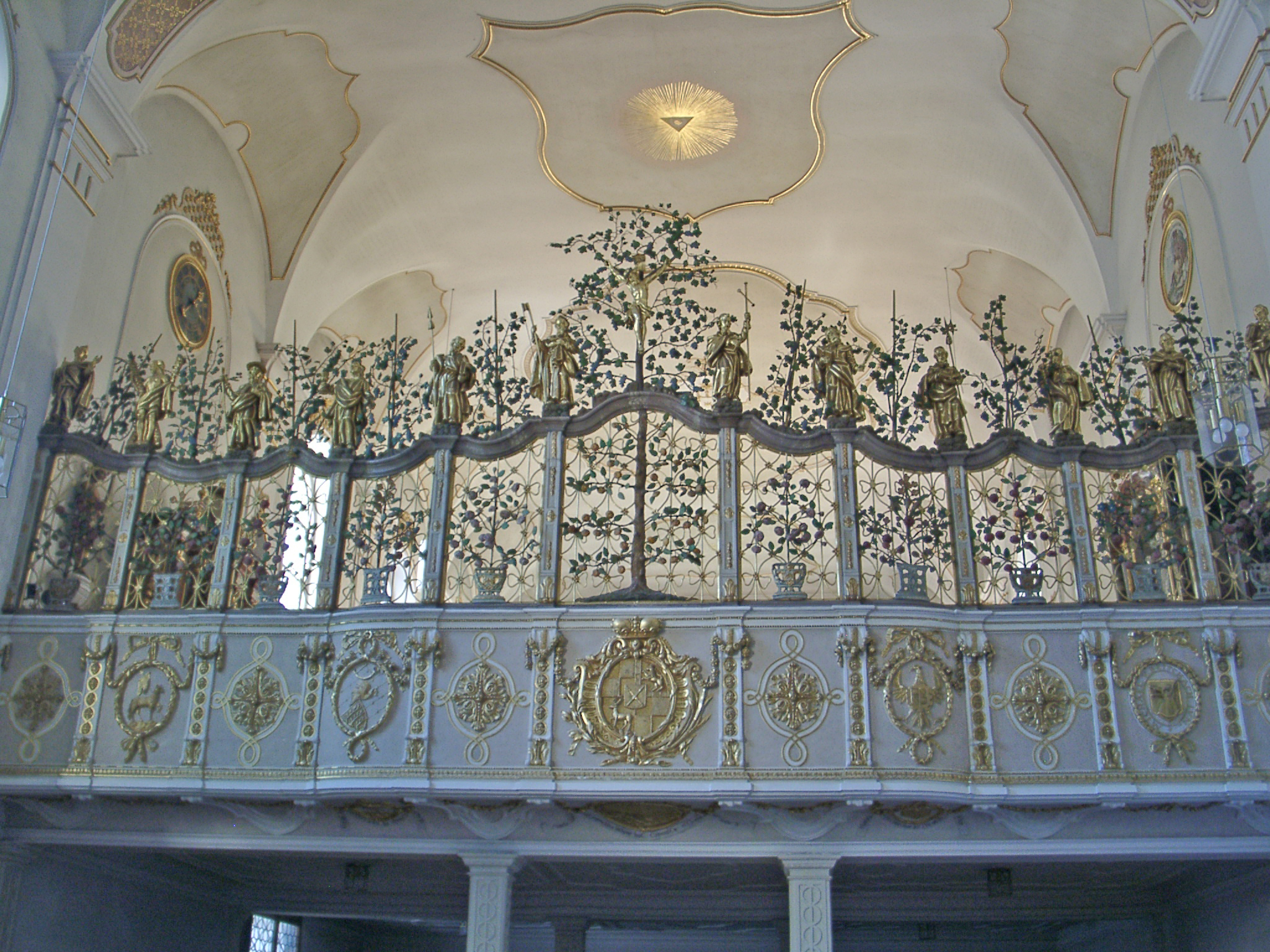 Inzigkofen Nonnenempore